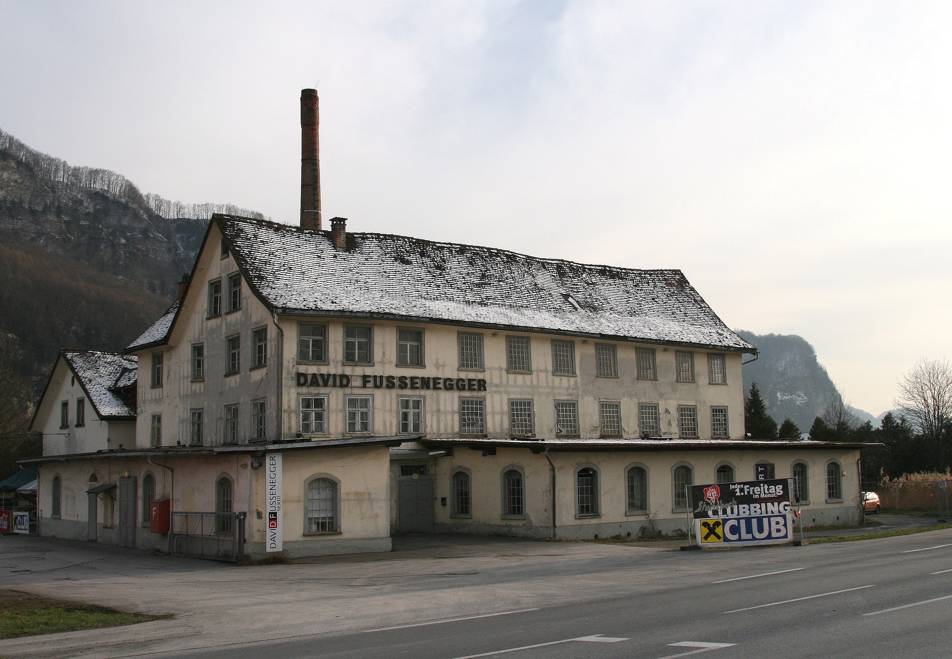 Firma IM / David Fussenegger Textilfabrik in Dornbirn, Hatlerdorf